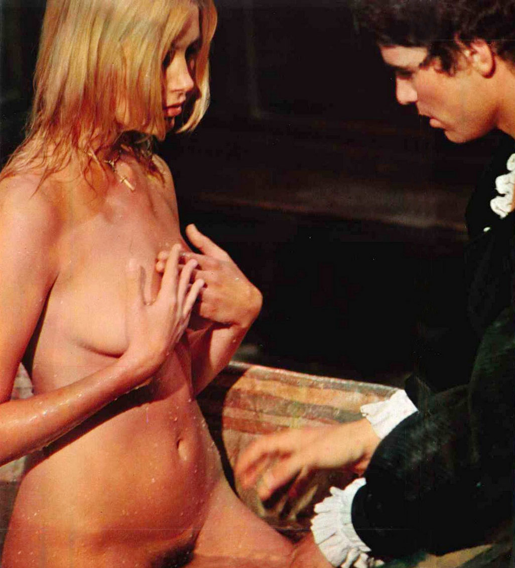 L'attrice svedese Janet Agren (a sinistra) in uno scatto di scena sul set del film Racconti proibiti... di niente vestiti (1972) di Brunello Rondi; si scorge anche l'attore Ben Ekland (a destra).